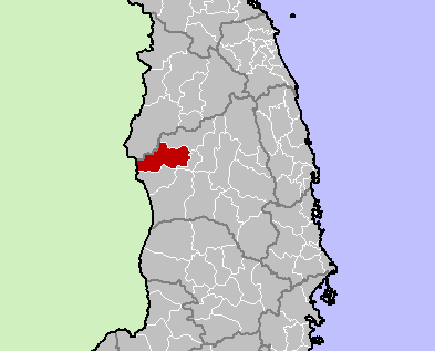 Ia Grai District, Gia Lai Province, Vietnam.